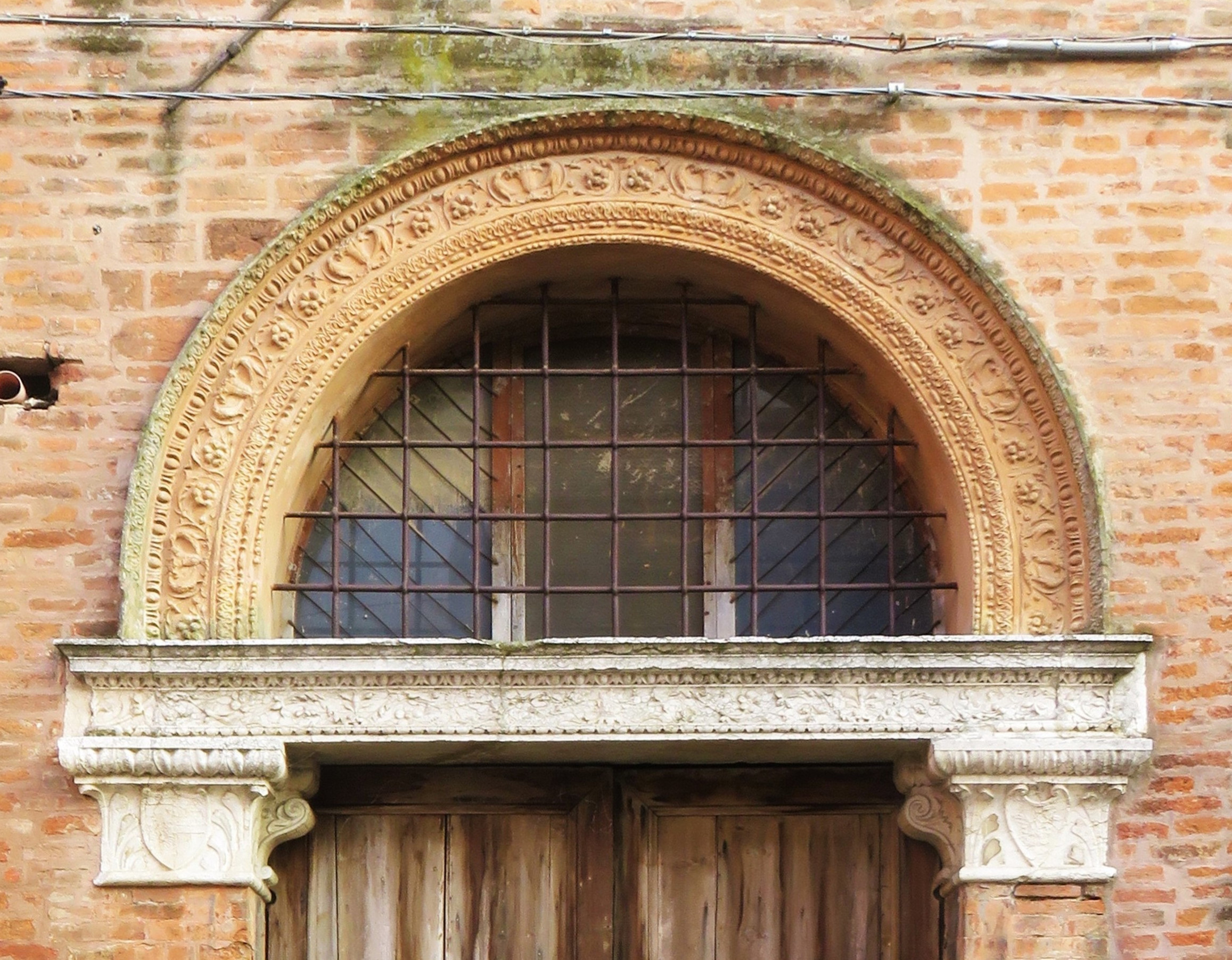 portale di Casa Novi, Via Borgo di Sotto 58 Ferrara